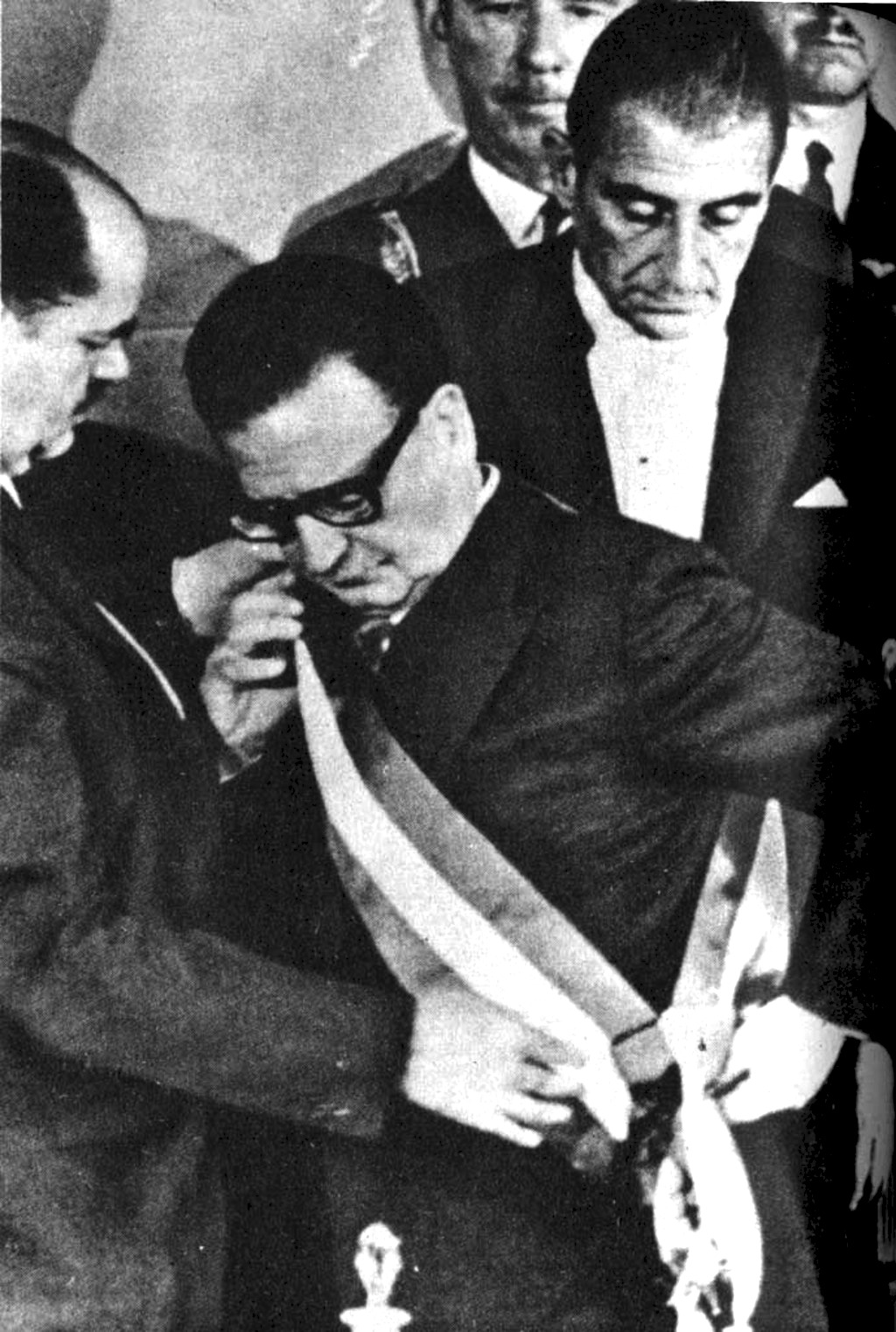 El Presidente del Senado Tomás Pablo coloca la banda presidencial a Salvador Allende. A su espalda Eduardo Frei Montalva.